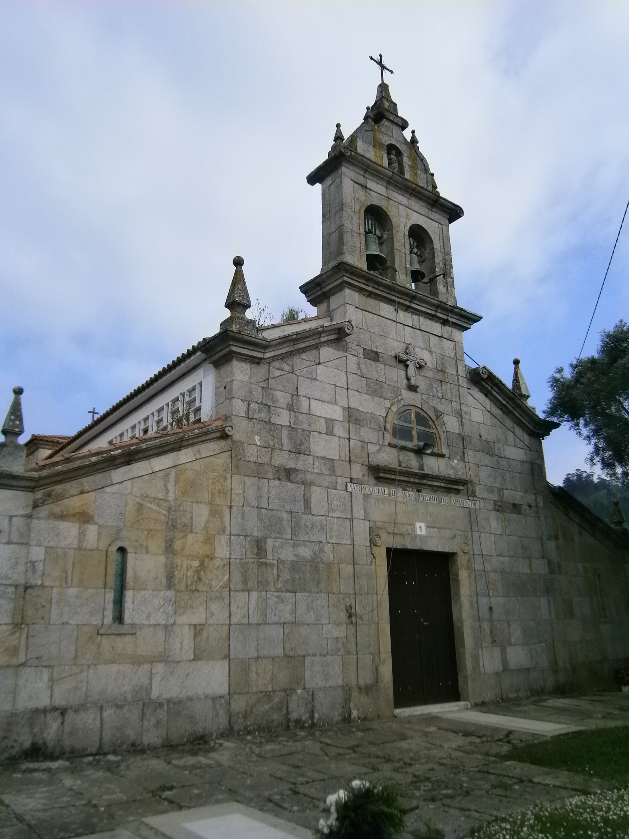 Igrexa de San Pedro de Armentón, Arteixo